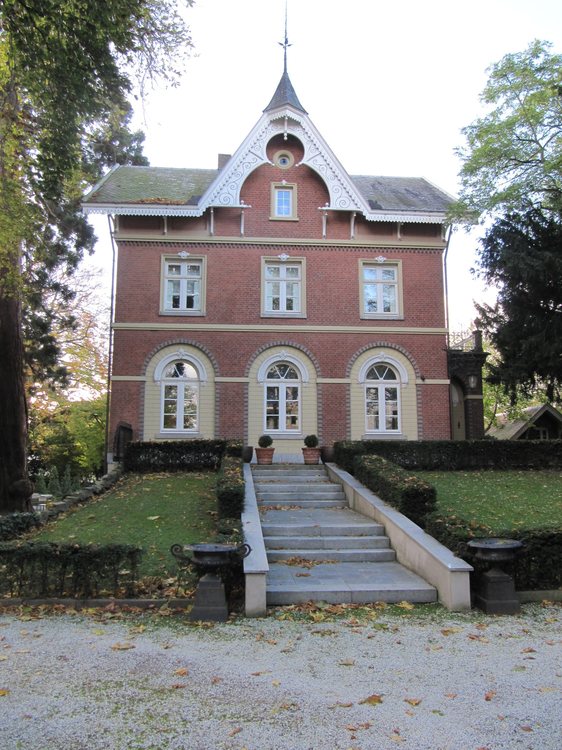 RM520528 Roermond.jpg